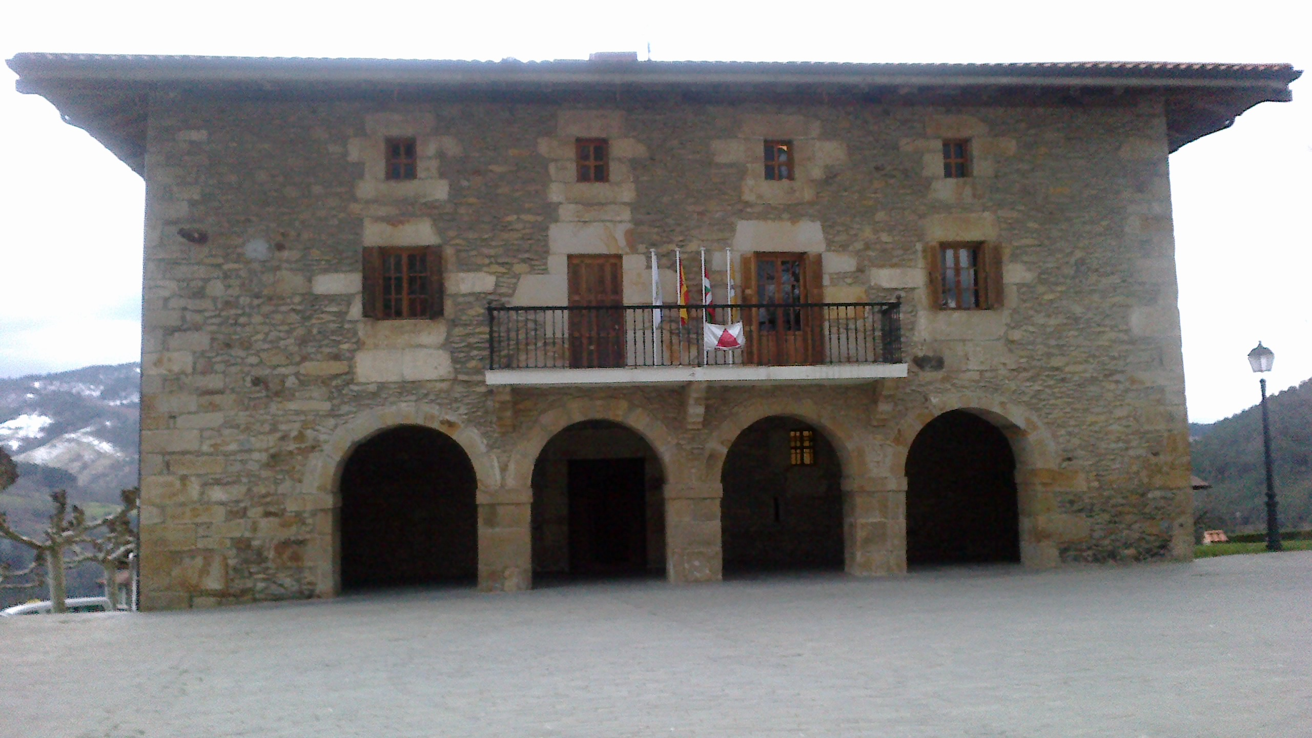 Gabiriako udaletxea (Gabiria, Gipuzkoa)